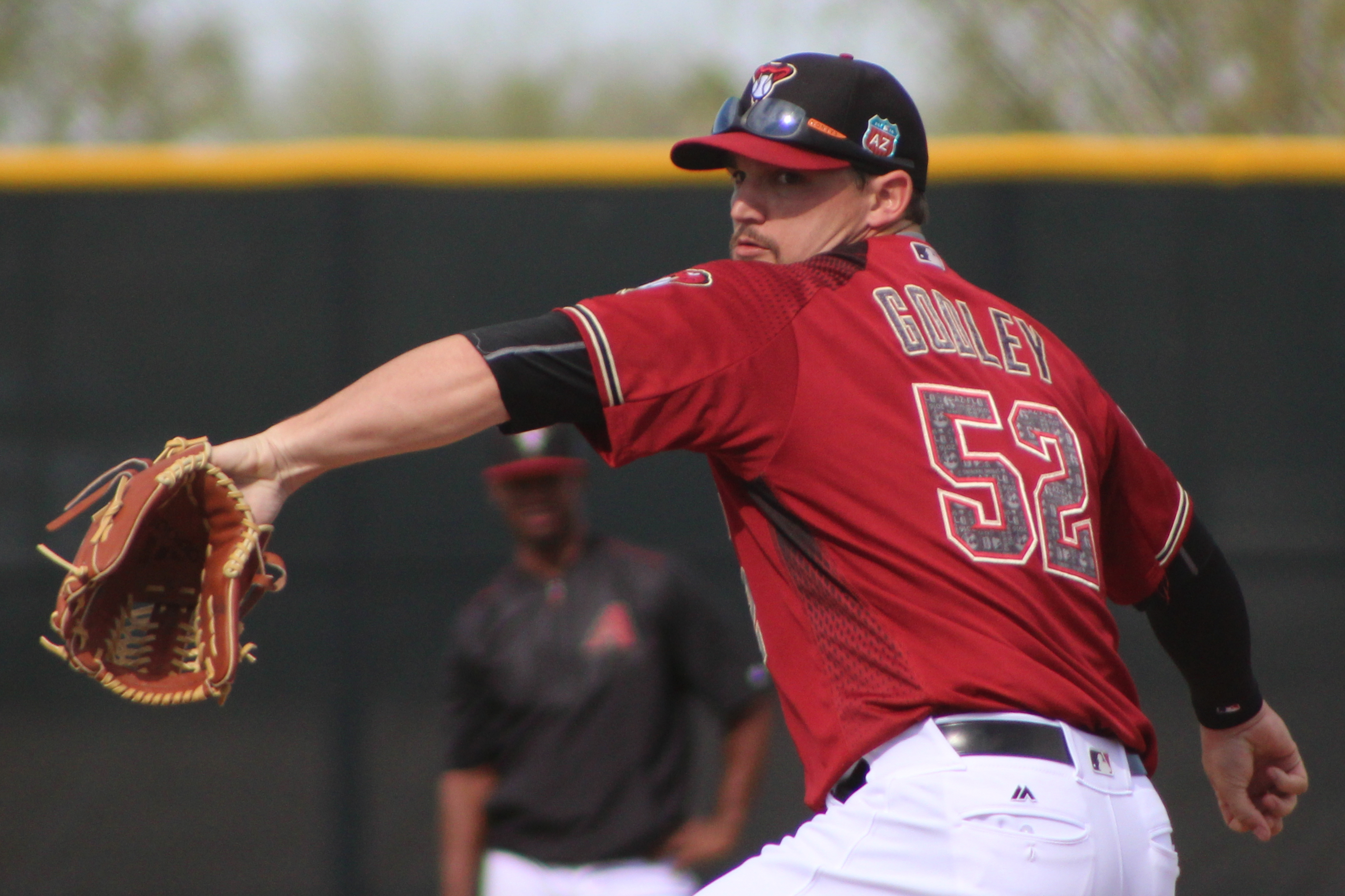 Zack Godley